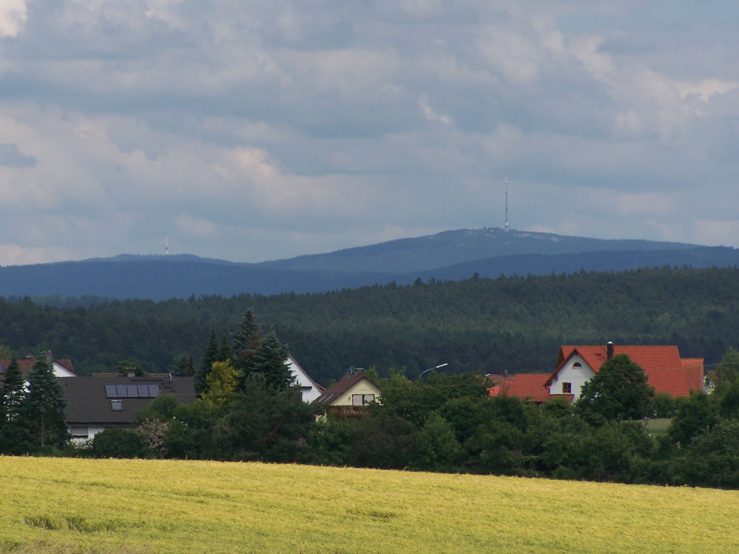 Schneeberg (links) und Ochsenkopf (rechts) von Heinersreuth aus gesehen.